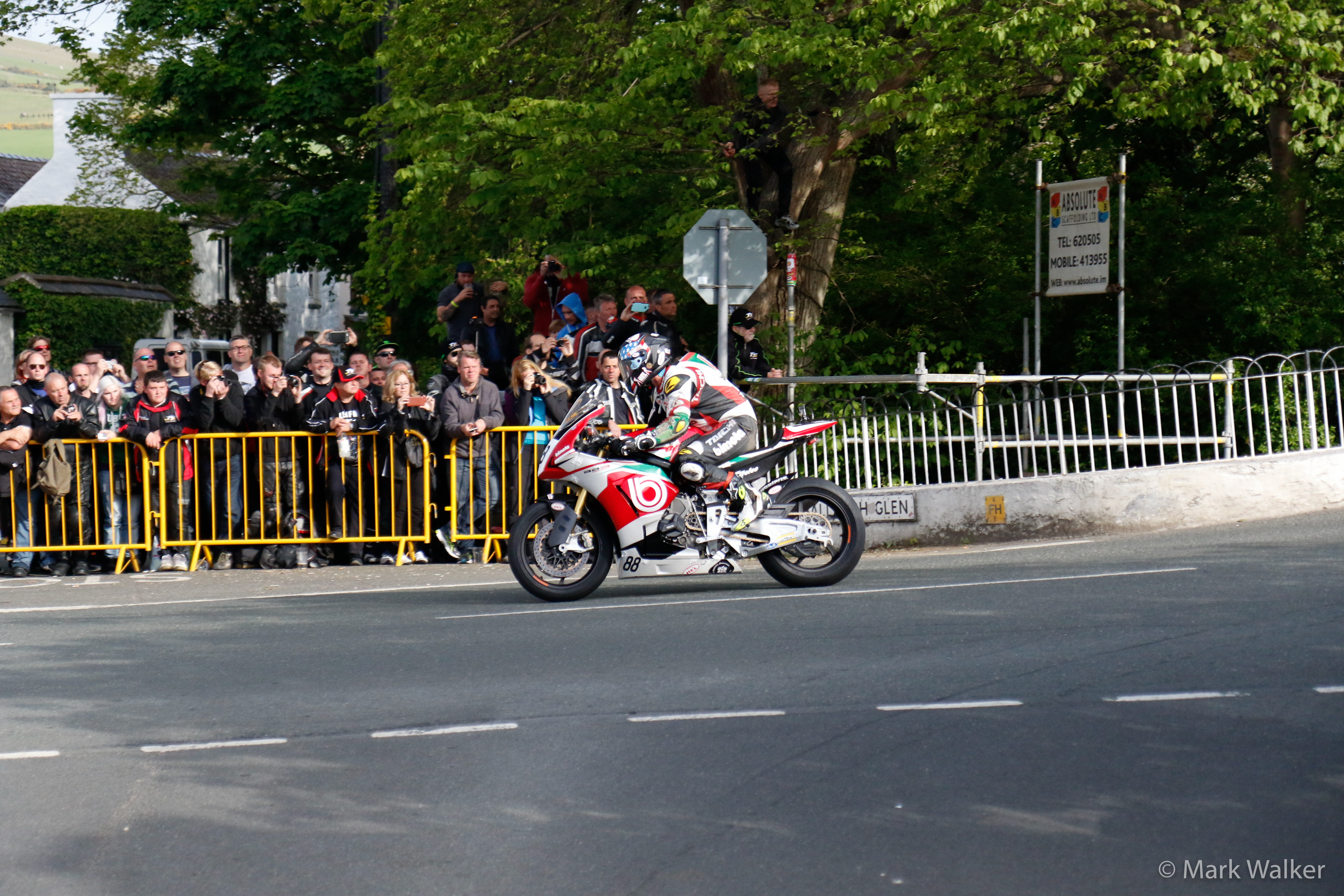 Ben Wylie sur la Bimota BB3 au TT 201